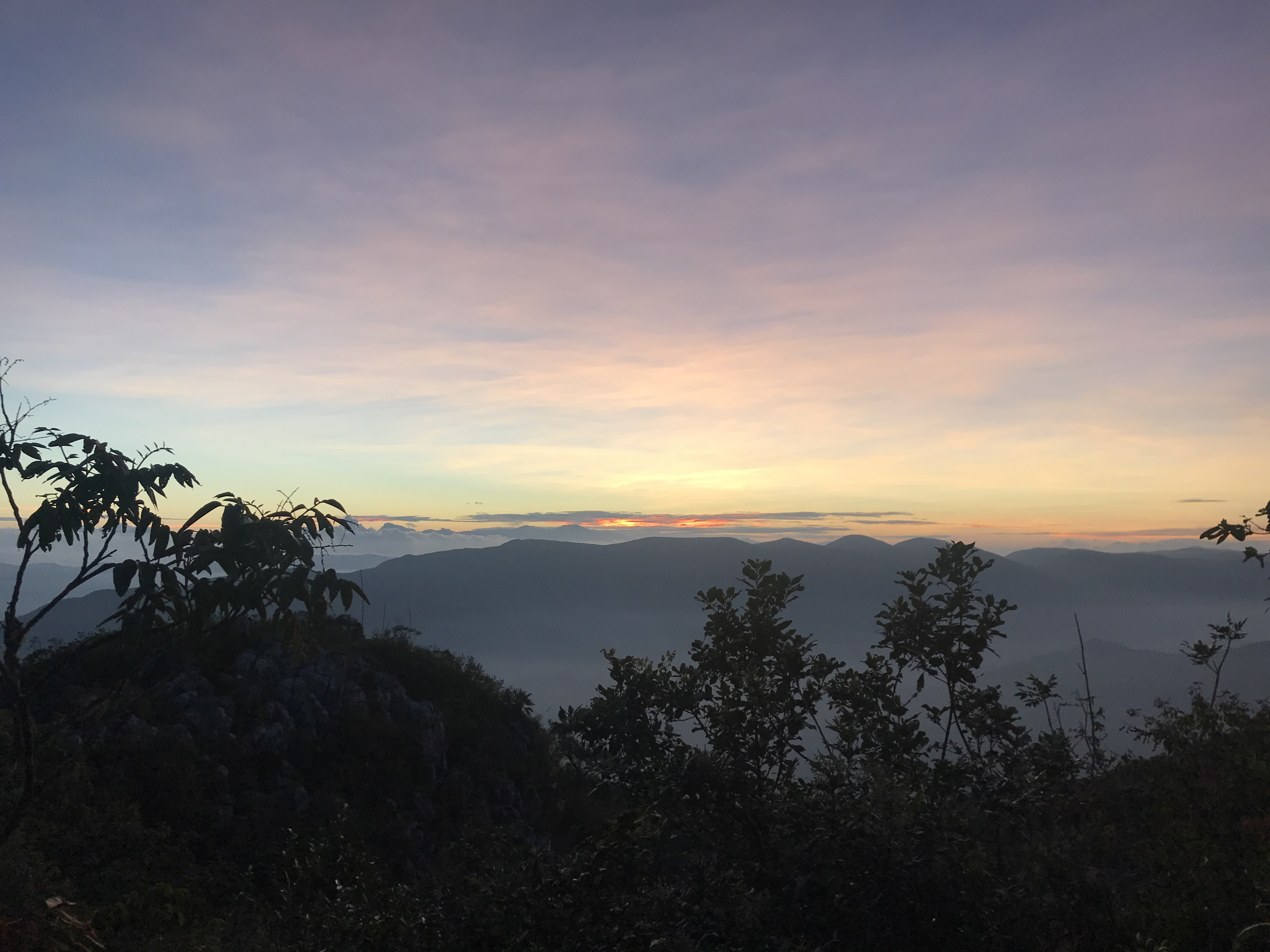 Vista desde la cima del Sótano de Barro, Arroyo Seco, Queretaro, México